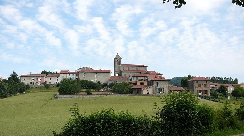 Vue sur La Chapelle sur Coise depuis la Madonne